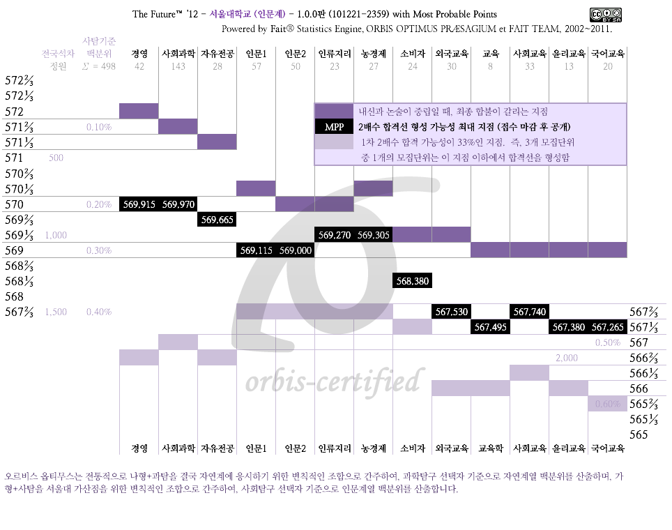 오르비(오르비스 옵티무스)의 2012학년도 서울대 인문계 배치표